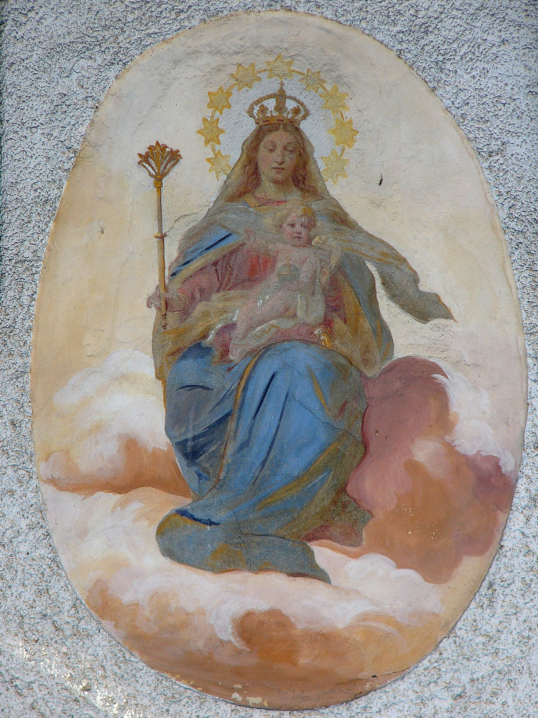 Wandmalerei; (Muttergottes), Anfang 20. Jh.This is a photograph of an architectural monument.